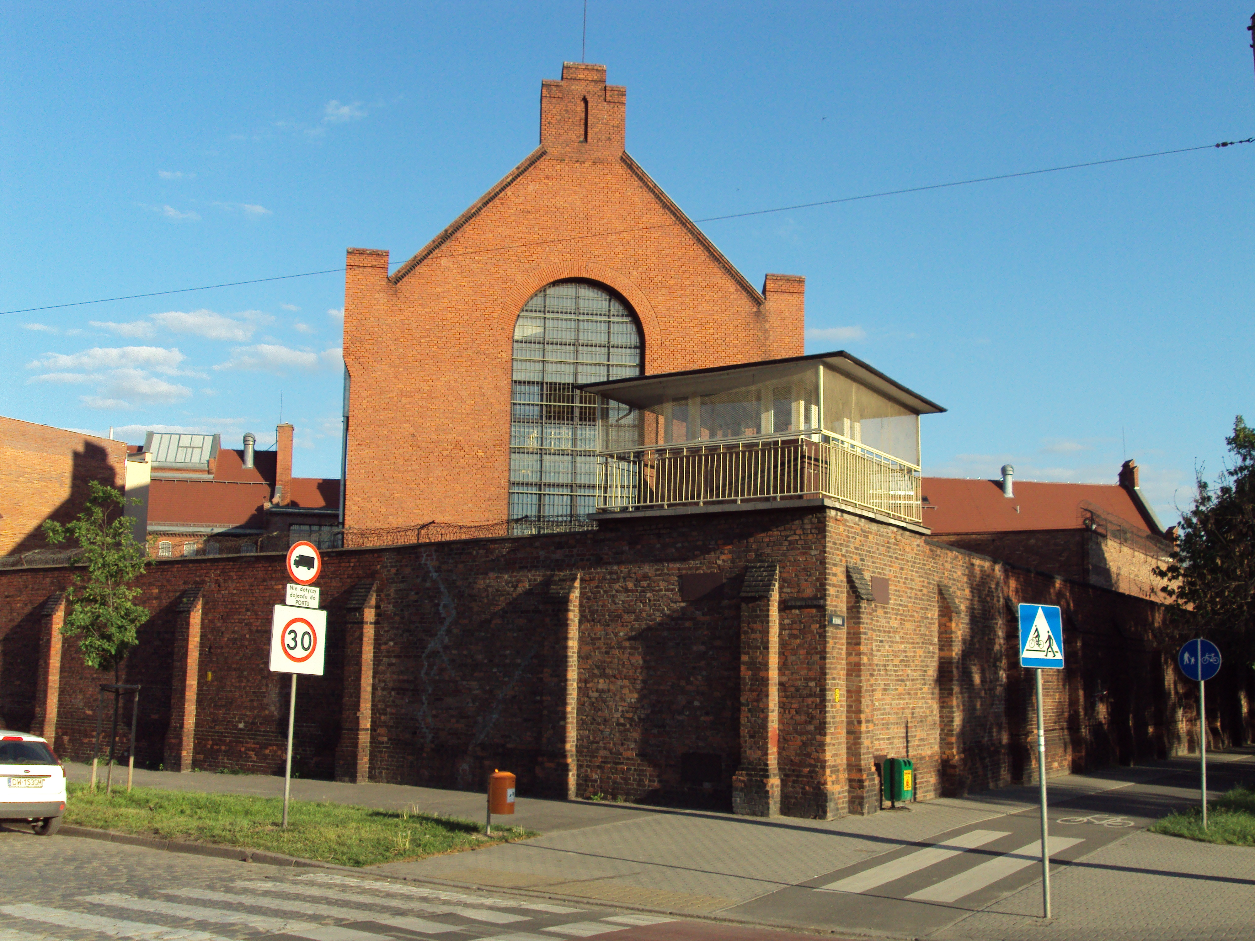 Zakład karny we Wrocławiu przy ul. Kleczkowskiej.